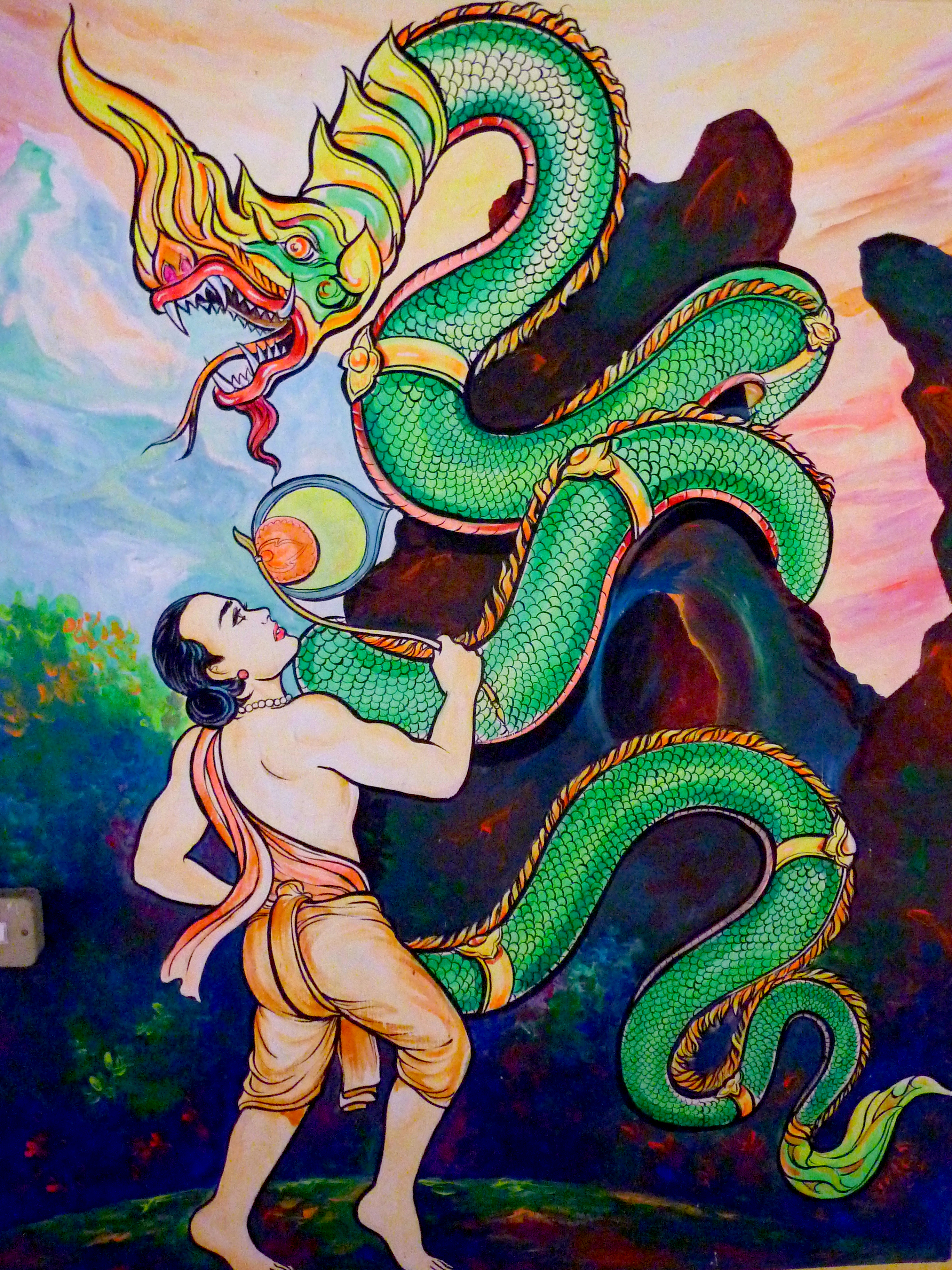 018 Bhuridattajataka, at Wat Olak Madu, Kedah